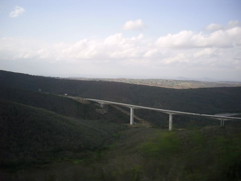 chegando em recife para trocar de ônibus